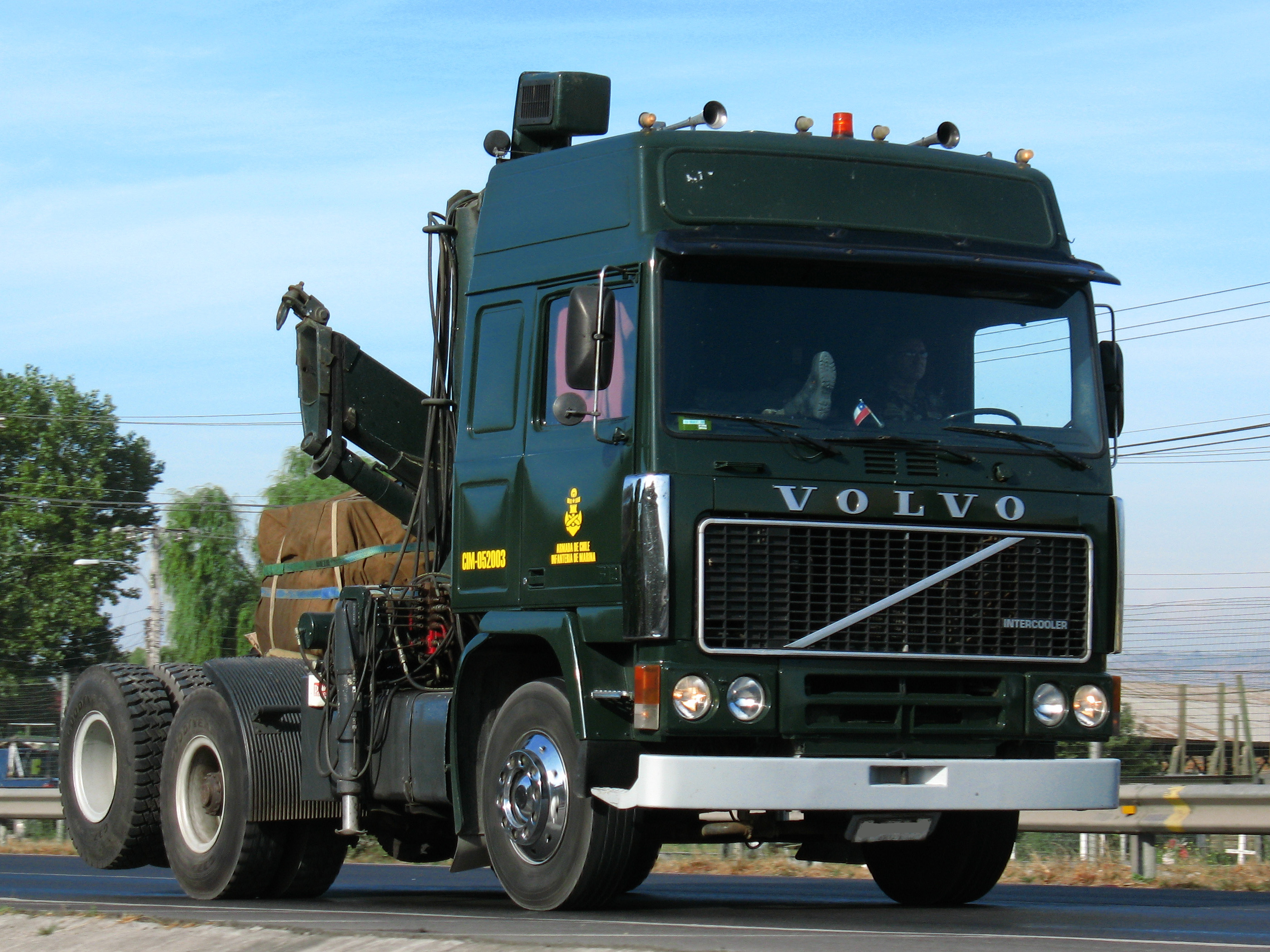 Volvo F12 1982